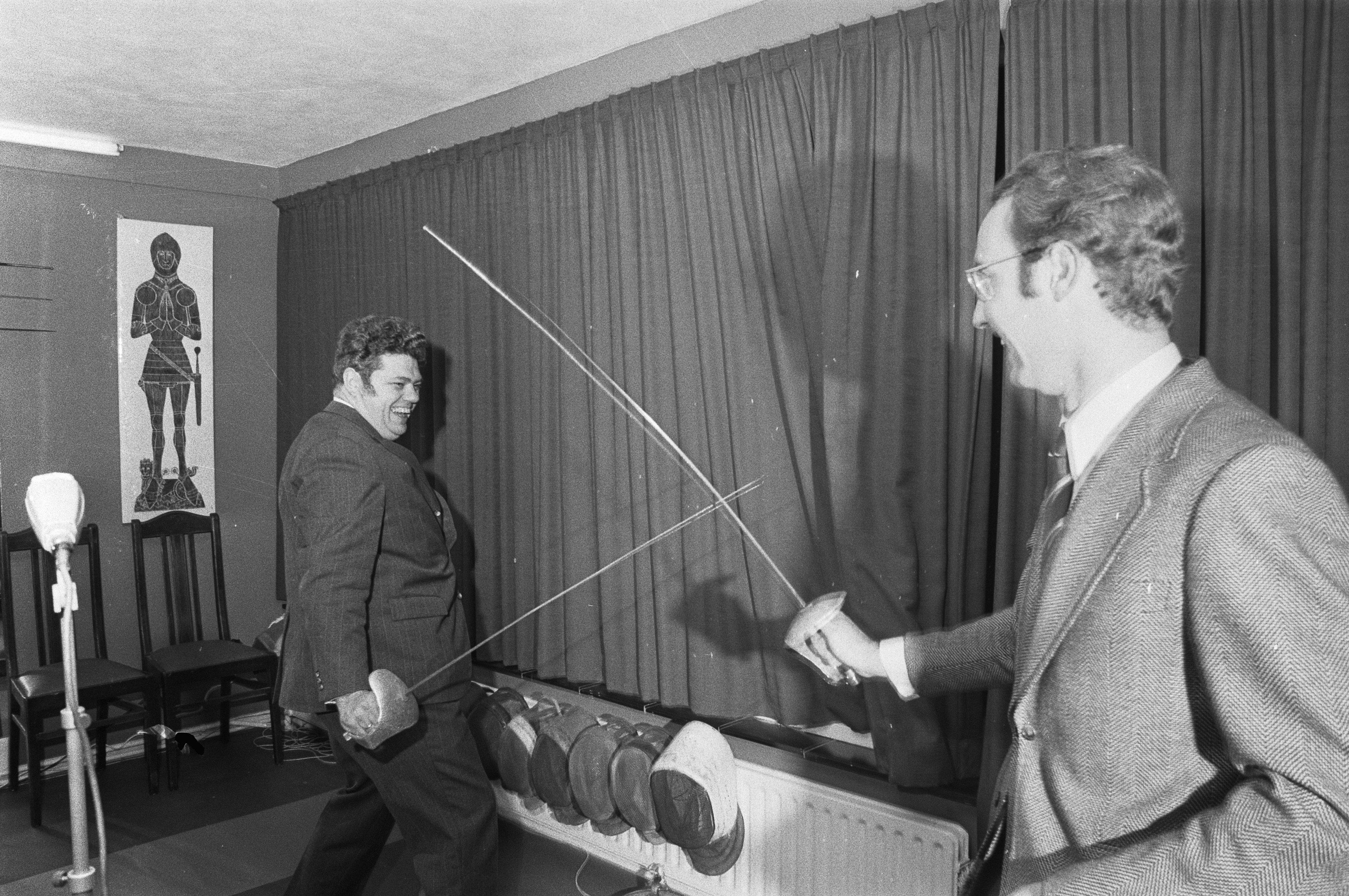 Collectie / Archief : Fotocollectie Anefo Reportage / Serie : [ onbekend ] Beschrijving : Staatssecretaris Vonhoff opent schermschool "Van Oeveren", Amsterdam, (l) Vonhoff en (r) Max Dwinger met sabels Datum : 4 november 1971 Locatie : Amsterdam, Noord-Holland Trefwoorden : openingen, schermen, sport, staatssecretarissen Persoonsnaam : Dwinger, Max, Vonhoff, Henk Fotograaf : Mieremet, Rob / Anefo, [onbekend] Auteursrechthebbende : Nationaal Archief Materiaalsoort : Negatief (zwart/wit) Nummer archiefinventaris : bekijk toegang 2.24.01.05 Bestanddeelnummer : 925-1071 Reacties Geplaatst door Wiebe Mokken op 02 januari 2012 - 17:51. Voor de goede orde: De correcte naam is Max Dwinger, met een 'r'. En de heren poseren met een sabel. Dwinger kwam als jongeling voor Nederland uit op de Olympische Spelen.